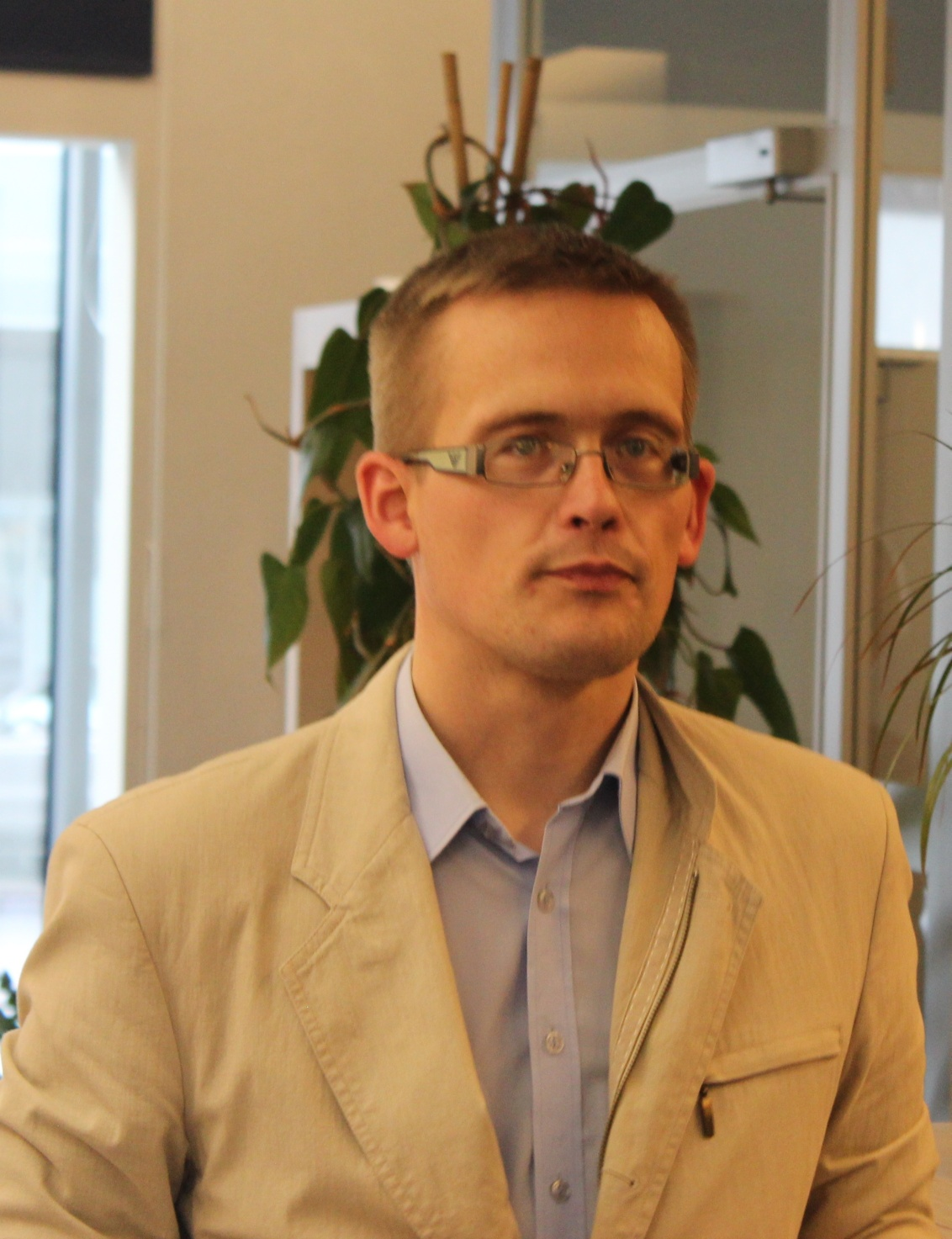 Toomas Schvak Vikipeedia tõlketalgute lõpetamisel.